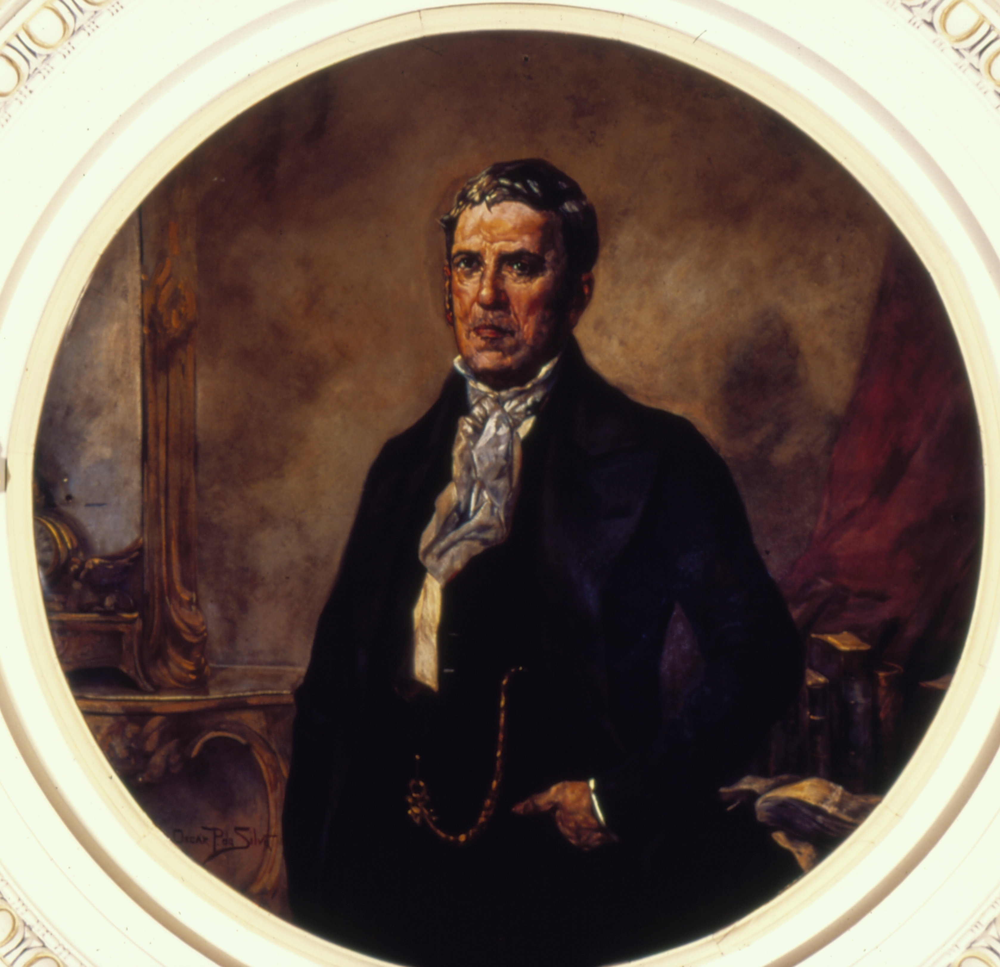 Obra que integra o acervo do Museu Paulista da USP. Coleção Fundo Museu Paulista - FMP